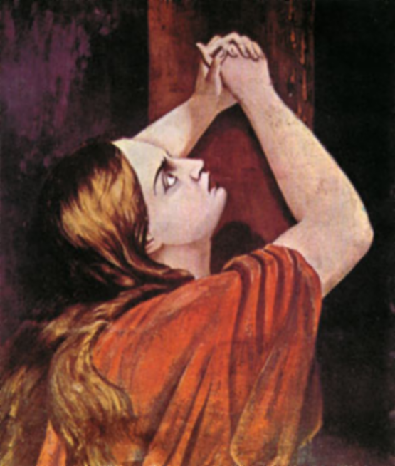 Quadro a óleo pintado pelo poeta brasileiro Antônio Frederico de Castro Alves, intitulado "Madalena aos Pés da Cruz"